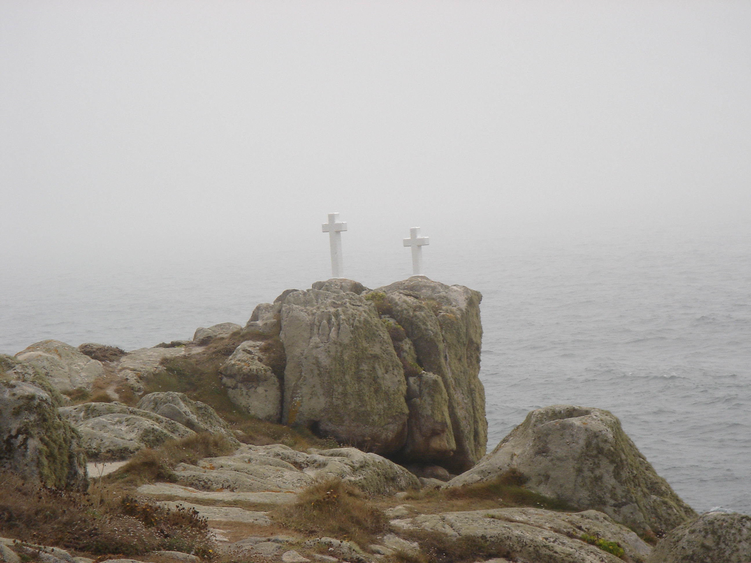 Cruces en honor a los muertos en el Cabo Roncudo (Corme, España)